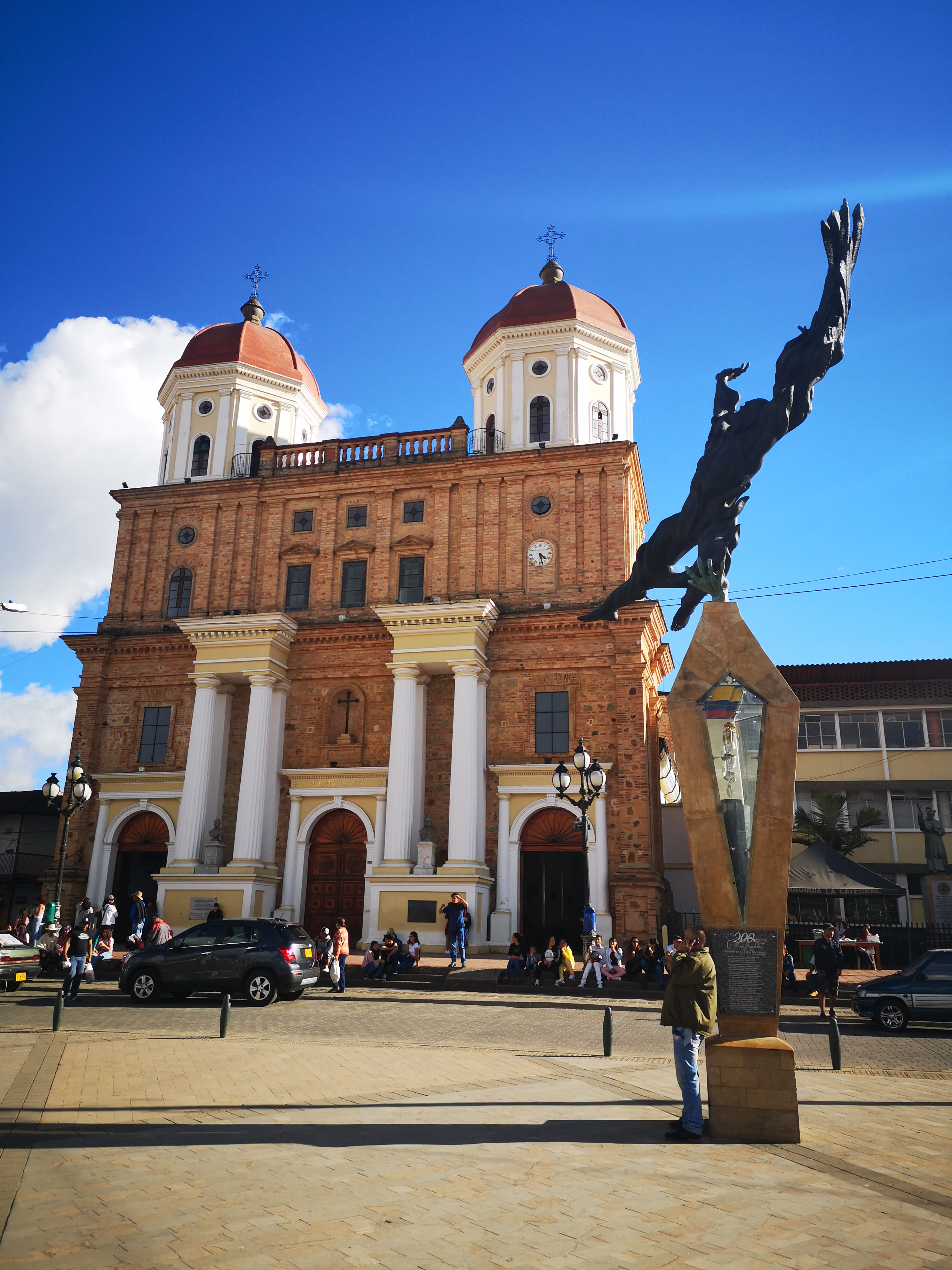 Catedral de Santa Rosa de Osos